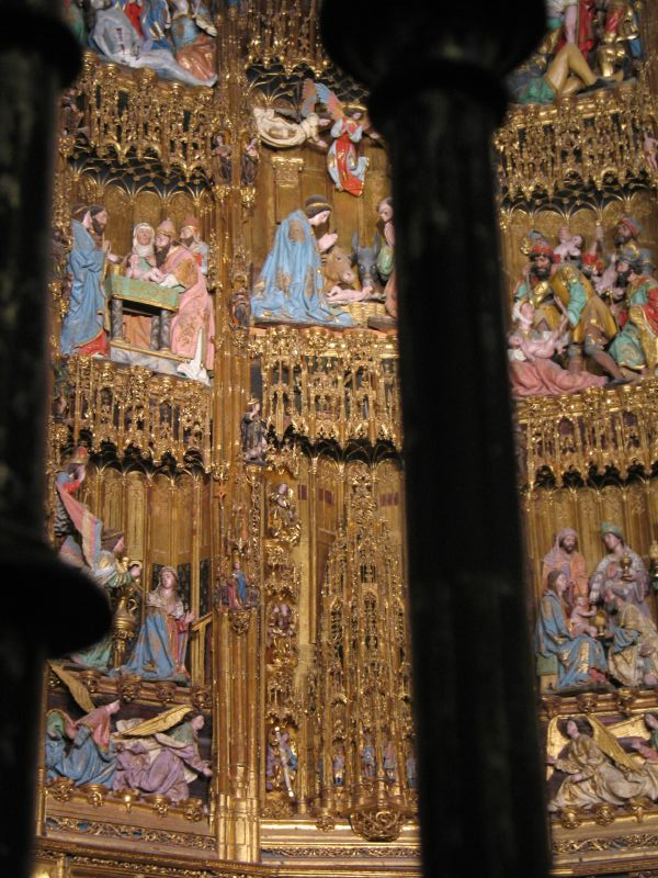 Detalle del Retablo Mayor de la Catedral de Toledo, España